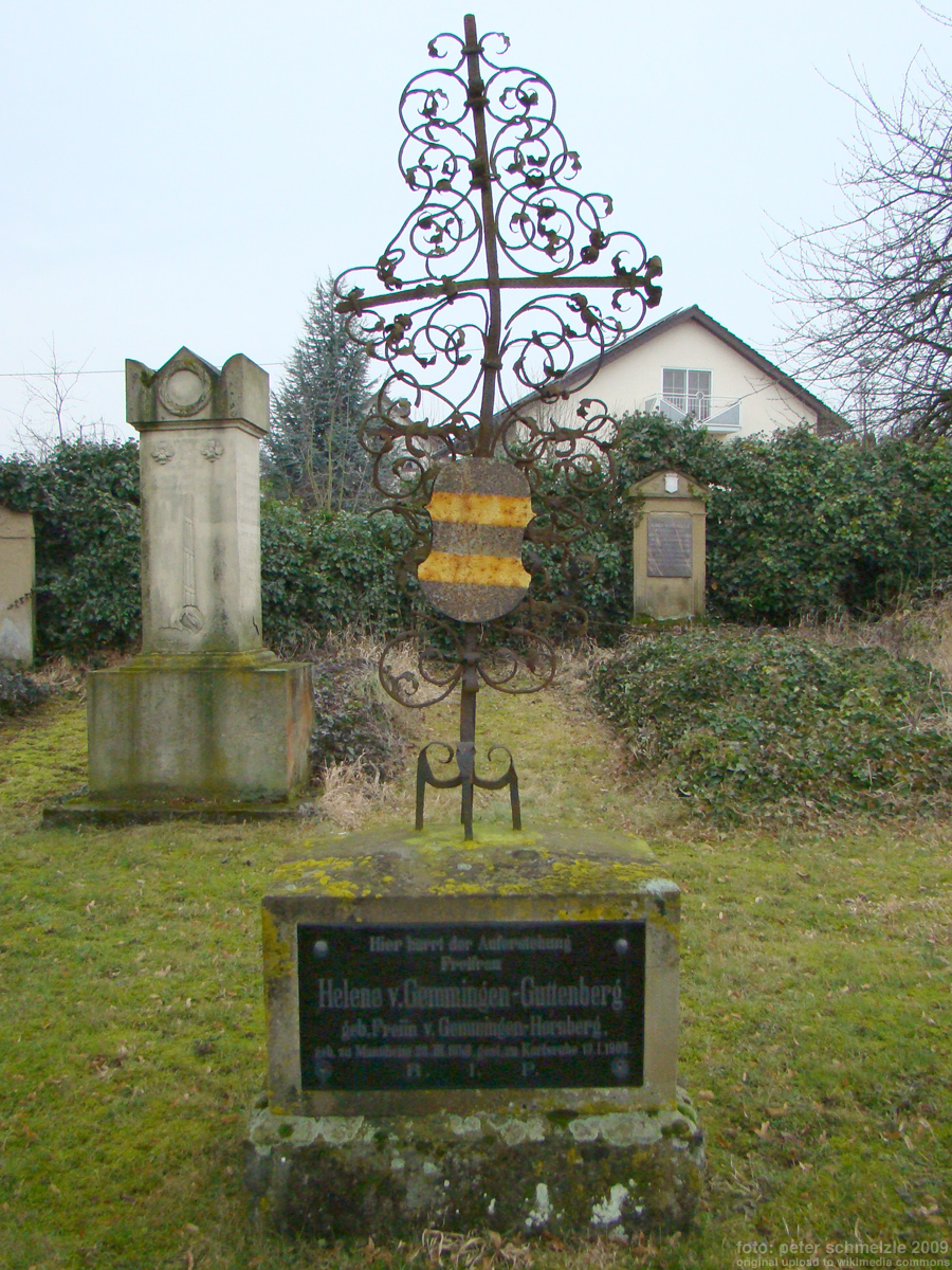 Grabmal für Freifrau Helene von Gemmingen-Guttenberg geb. von Gemmingen-Hornberg (1840-1905) auf dem Friedhof in Bad Rappenau-Bonfeld